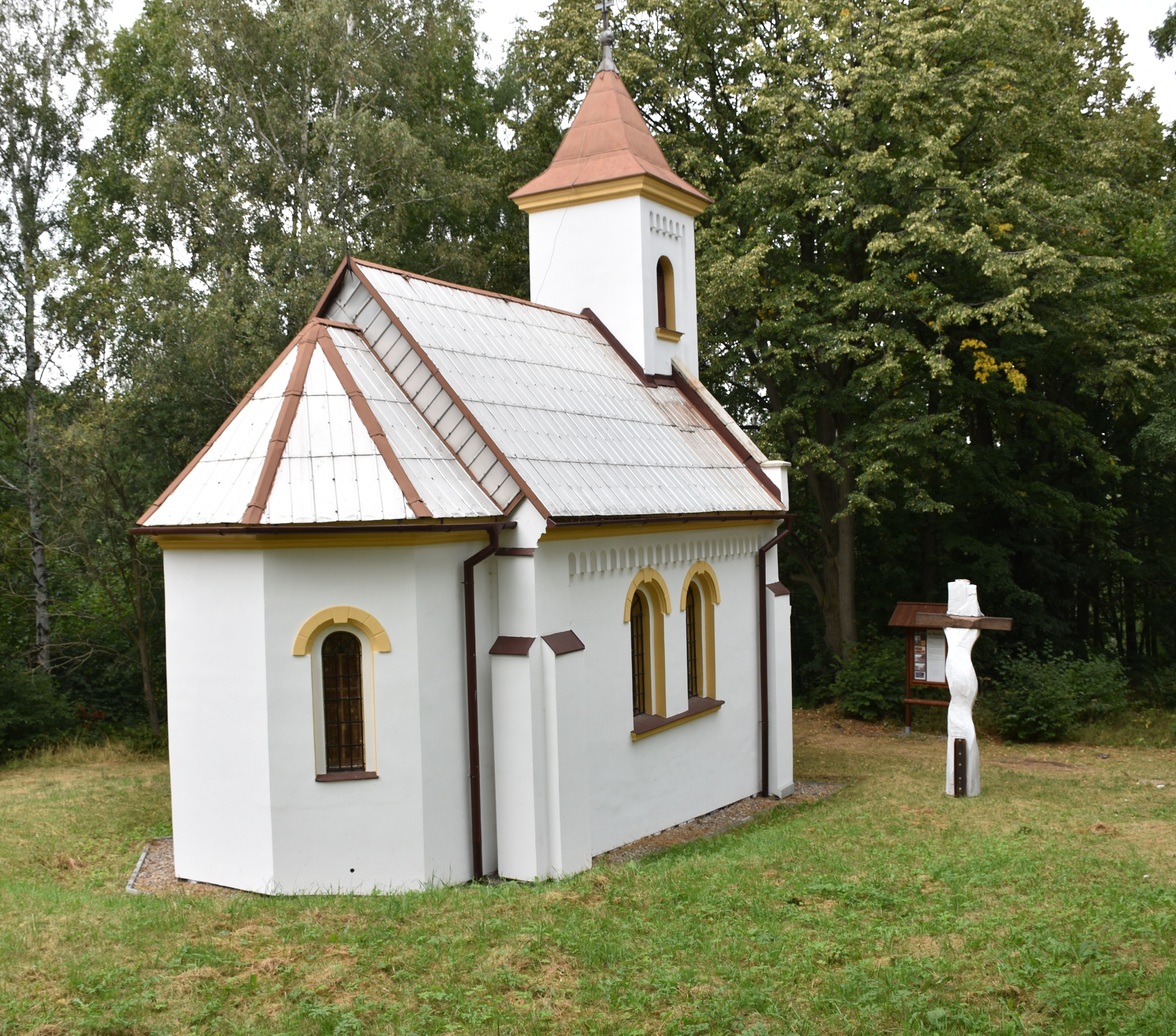 Kaple svatého Rocha v Červeném Dolu